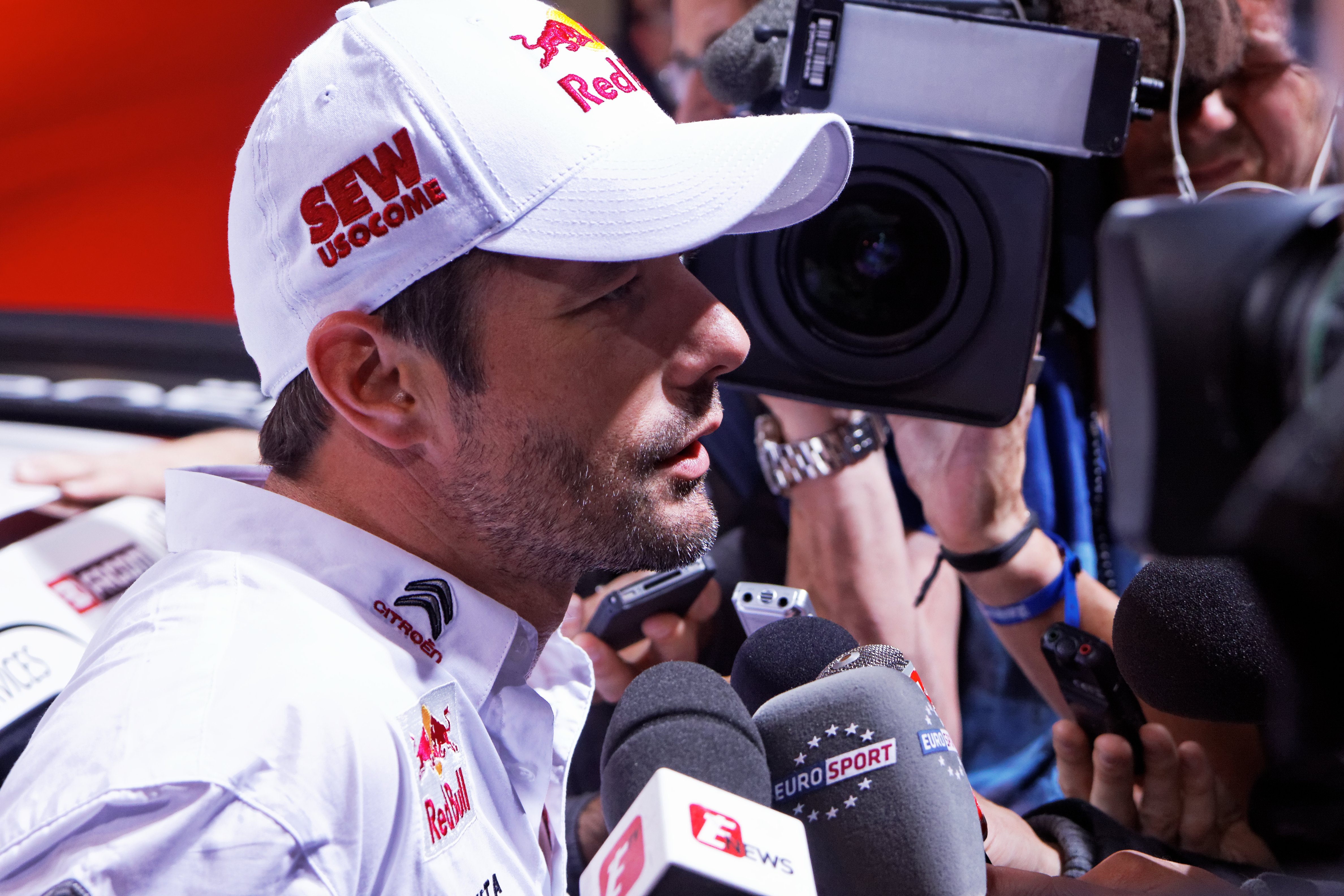 Sébastien Loeb interviewé lors du Mondial de l'Automobile de Paris 2012.